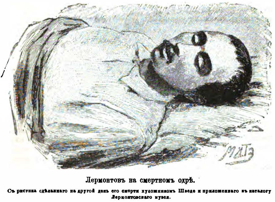 Рисунок сделан на следующий день после смерти М. Ю. Лермонтова